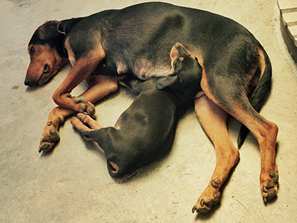 FCI No 241 Transsylvanischer Laufhund, Siebenbürgischer Laufhund, Ungarische Bracke (Siebenbürgischer Laufhund mit Welpen, Laika und Pui)